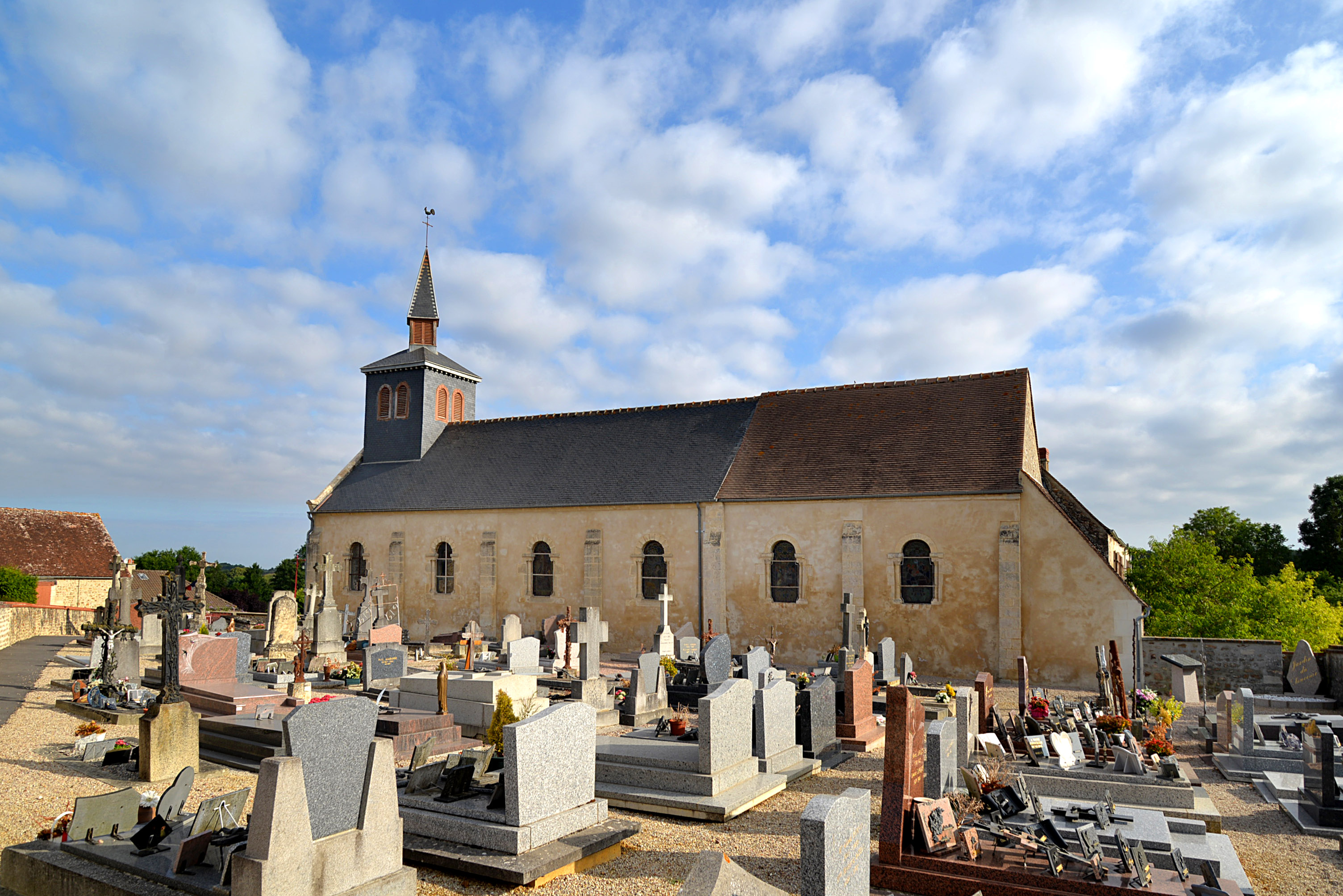 Brieux (Orne)